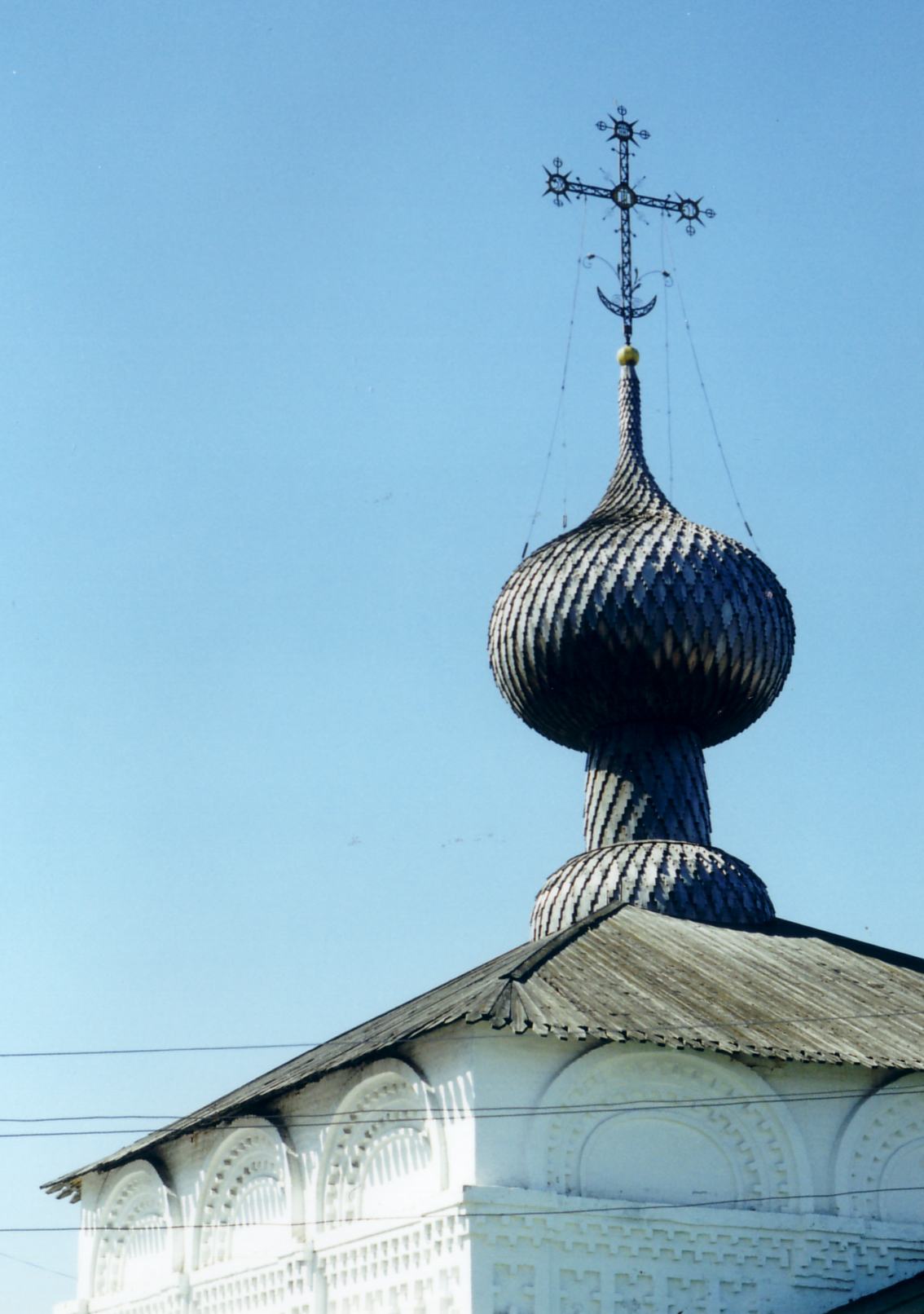 Введенская церковь. Город Соликамск